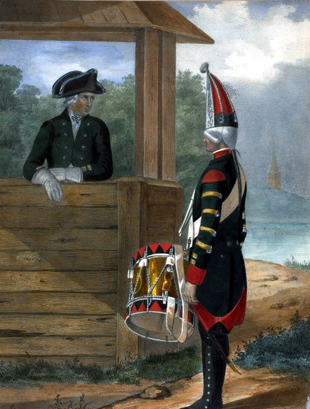 Офицер и Гренадерский Барабанщик Кабардинского Мушкетерского полка. 1797-1801.